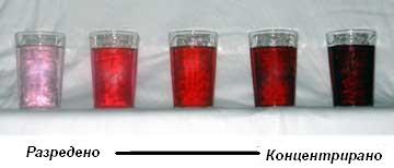 Автор:User:FirstPrinciples